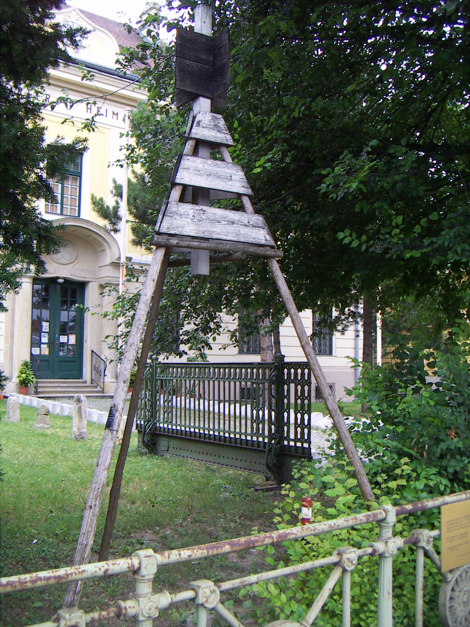 Kleine Pyramide als Signal im Festpunktfeld, Österreich, Bezirksmuseum Floridsdorf, Wien